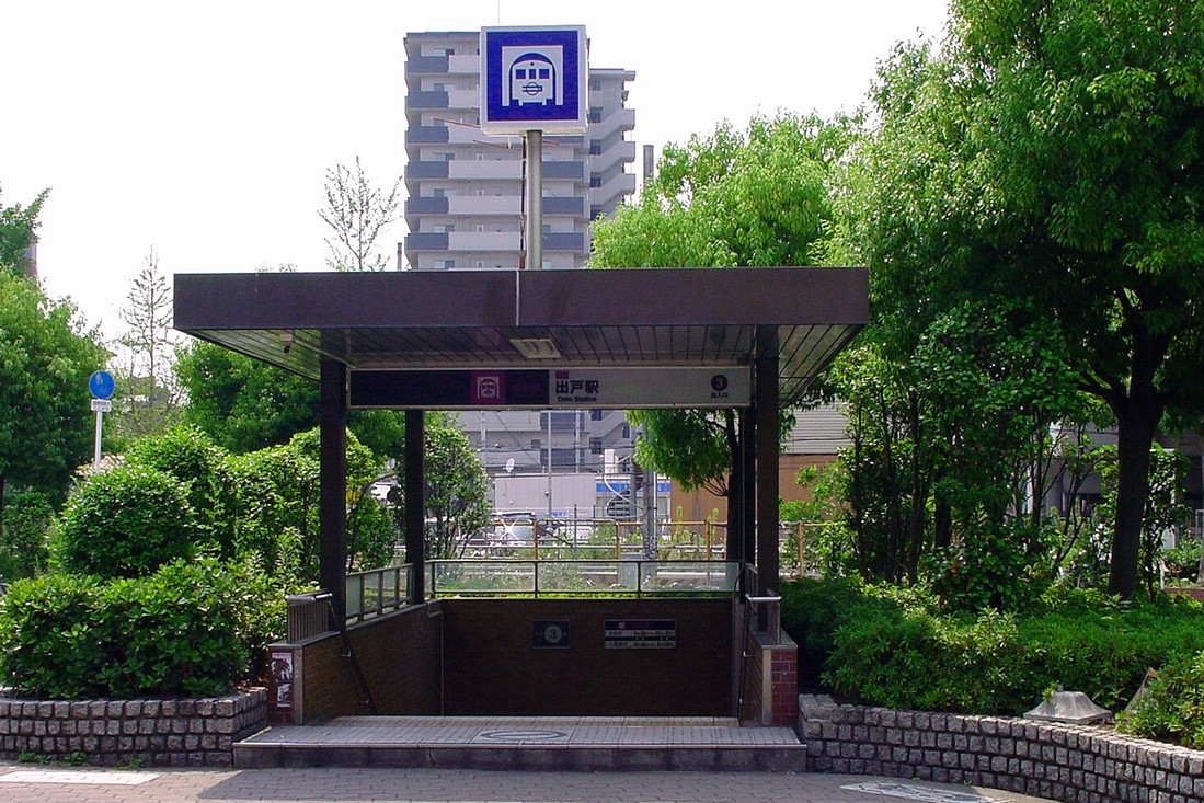 地下鉄谷町線出戸駅3号出入口